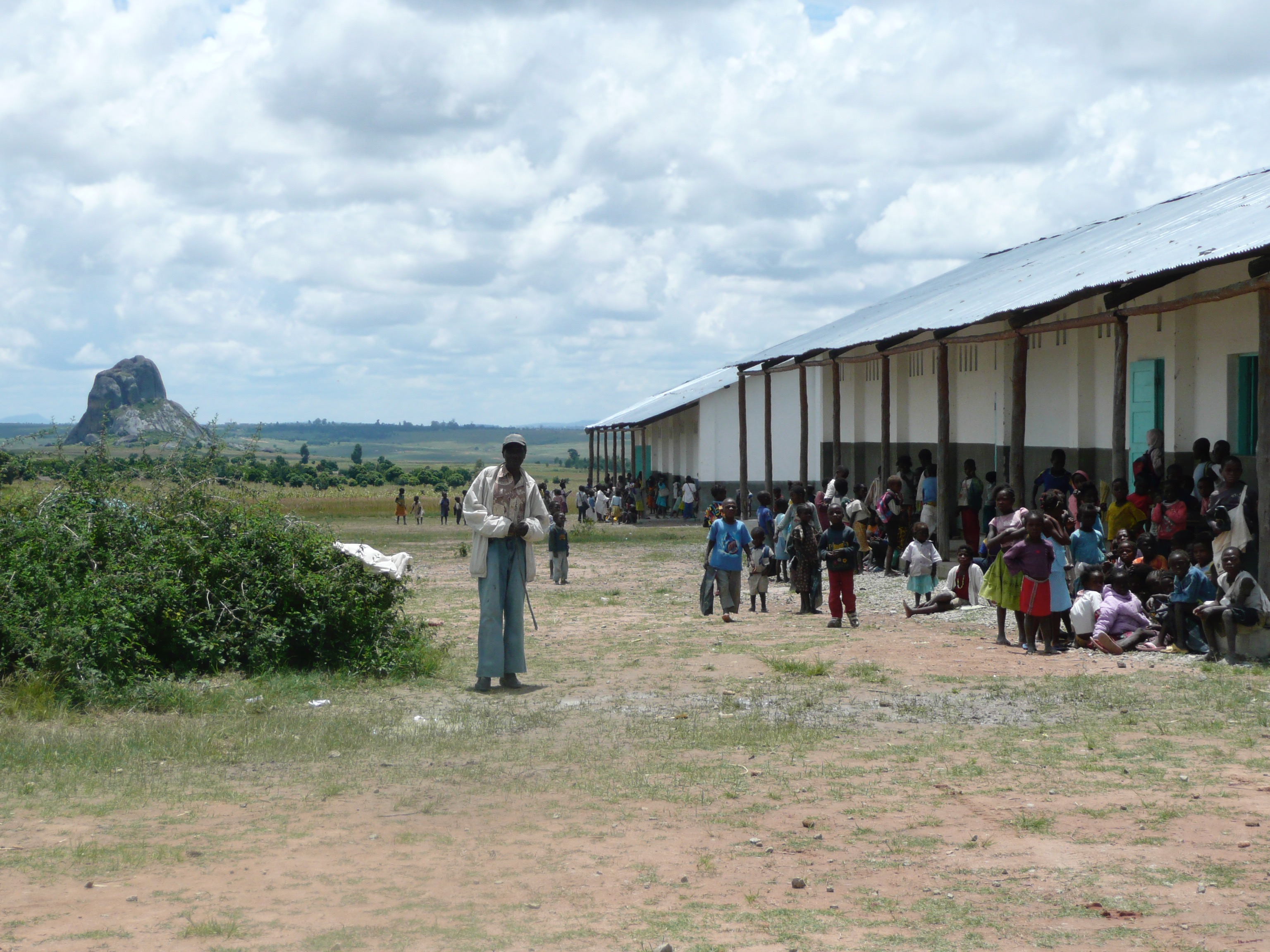 Skola på landsbygden i Angola